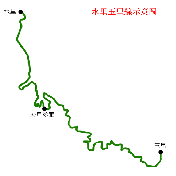 水里玉山線示意圖。